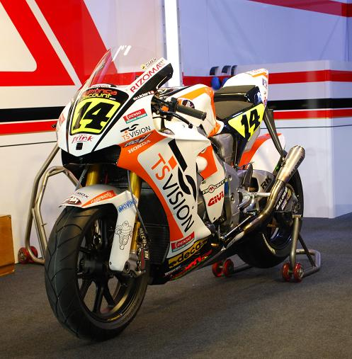 De Puniet's bike